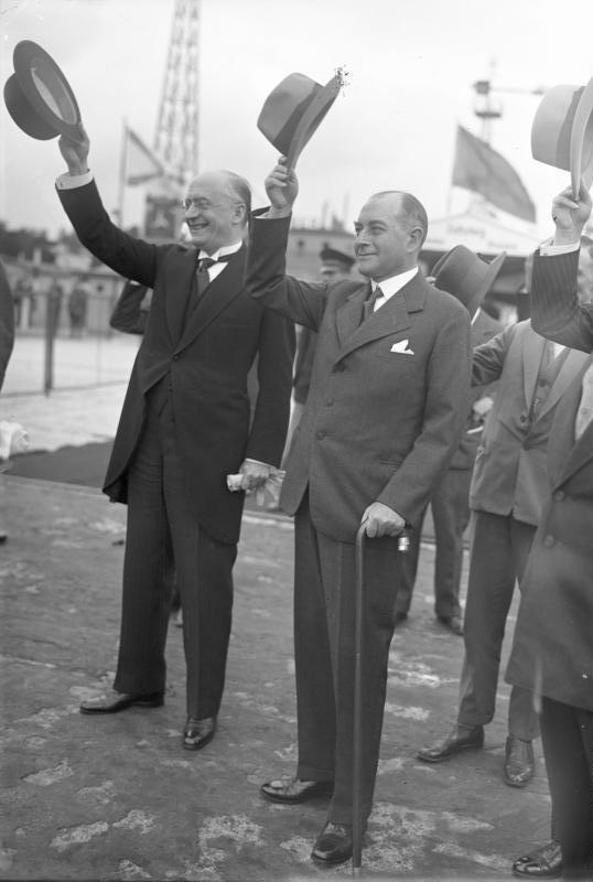 Die Abreise des englischen Premierministers Ramsay MacDonald von dem Zentralflughafen in Berlin-Tempelhof! Reichskanzler Dr. Brüning (links) und Reichsaussenminister Dr. Curtius (rechts) winken lebhaft beim Abflug des englischen Premierministers Ramsay MacDonald.